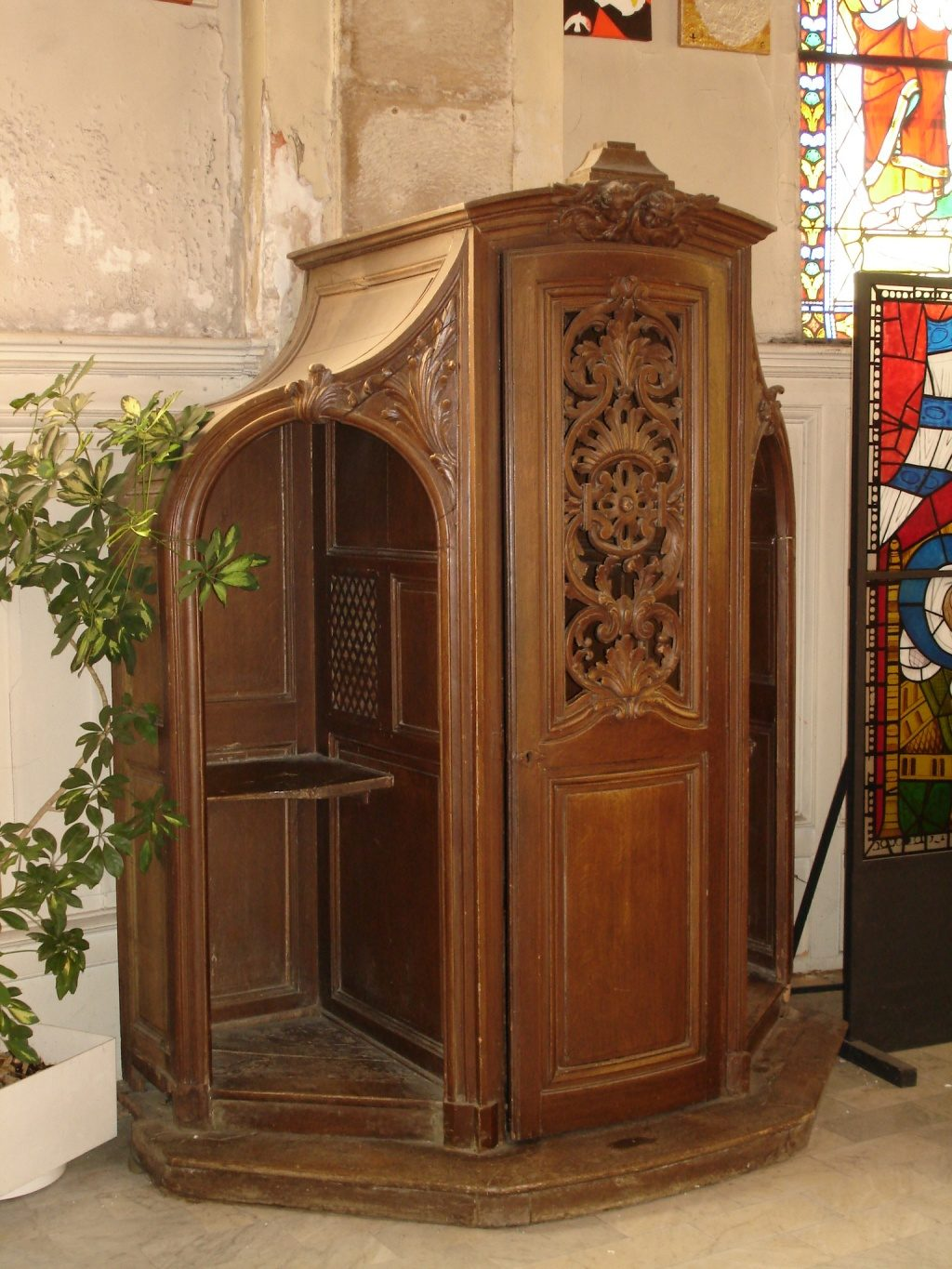 Confessionnal de l'église Saint-Germain à Soisy-sous-Montmorency (Val-d'Oise), France